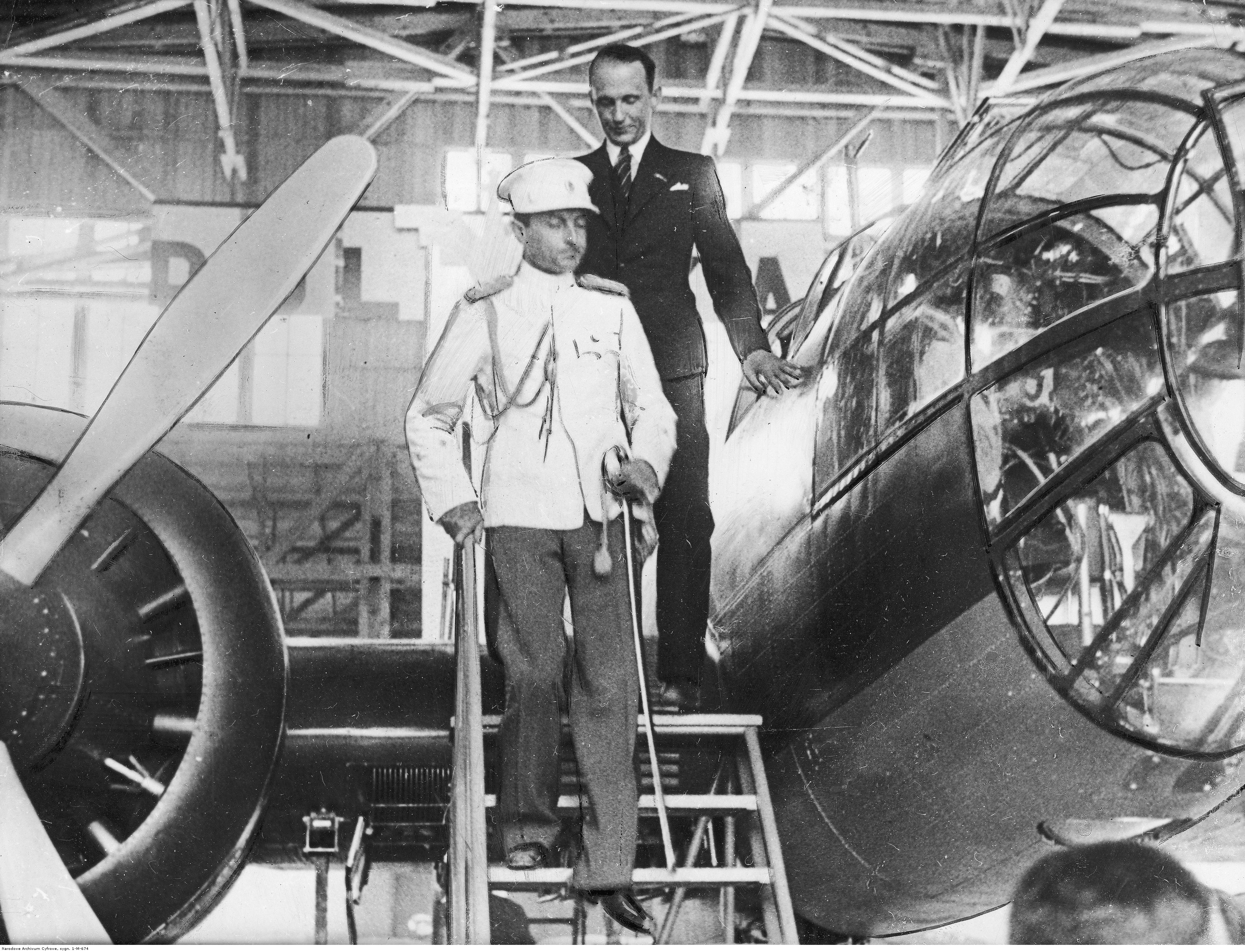 Książę regent Paweł Karadziordziewić podczas zwiedzania polskiego działu na Międzynarodowej Wystawie Lotniczej w Belgradzie. Widoczny fragment sylwetki samolotu PZL.37 Łoś.